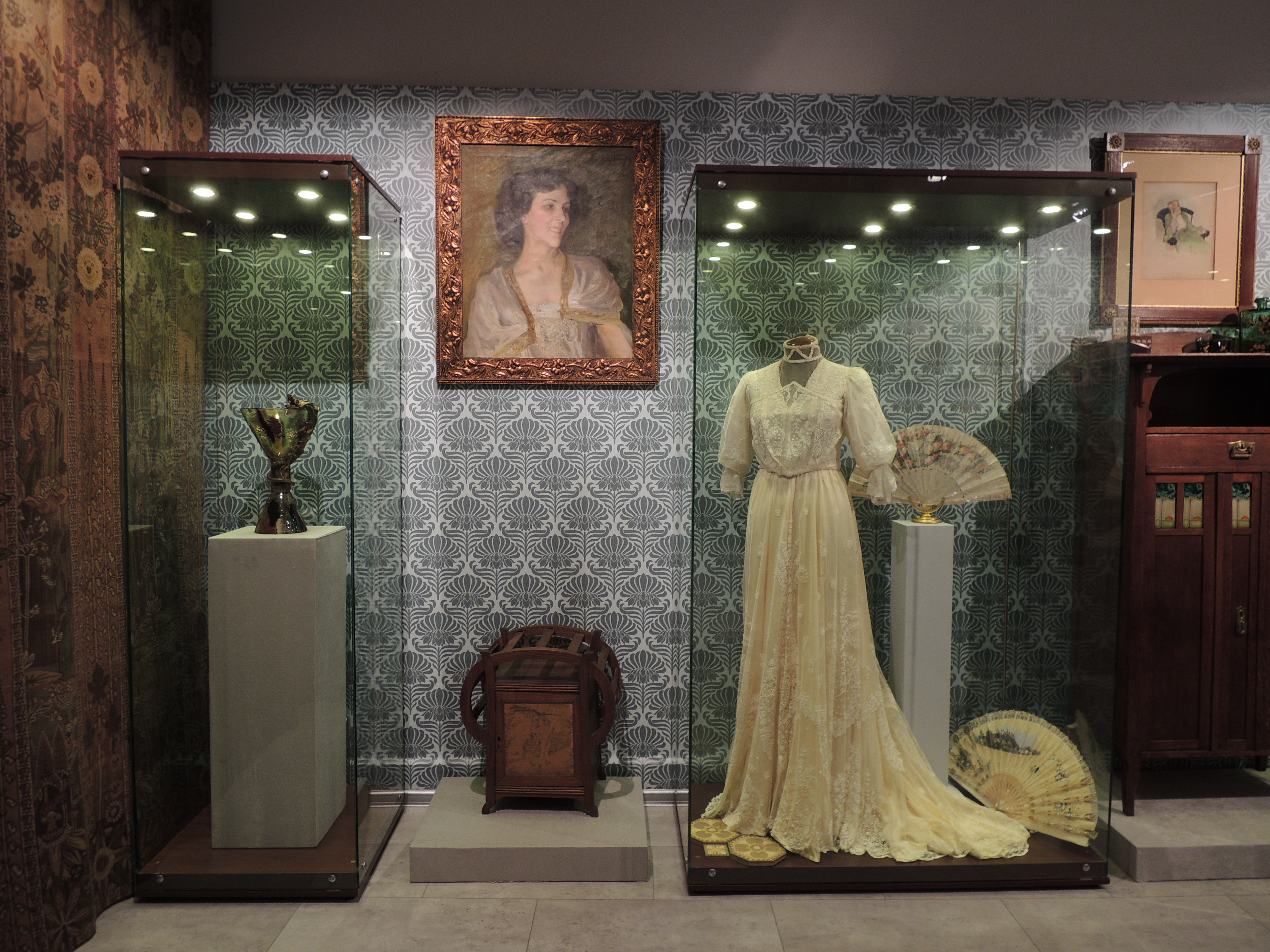 Dom Ikony na Spiridonovke